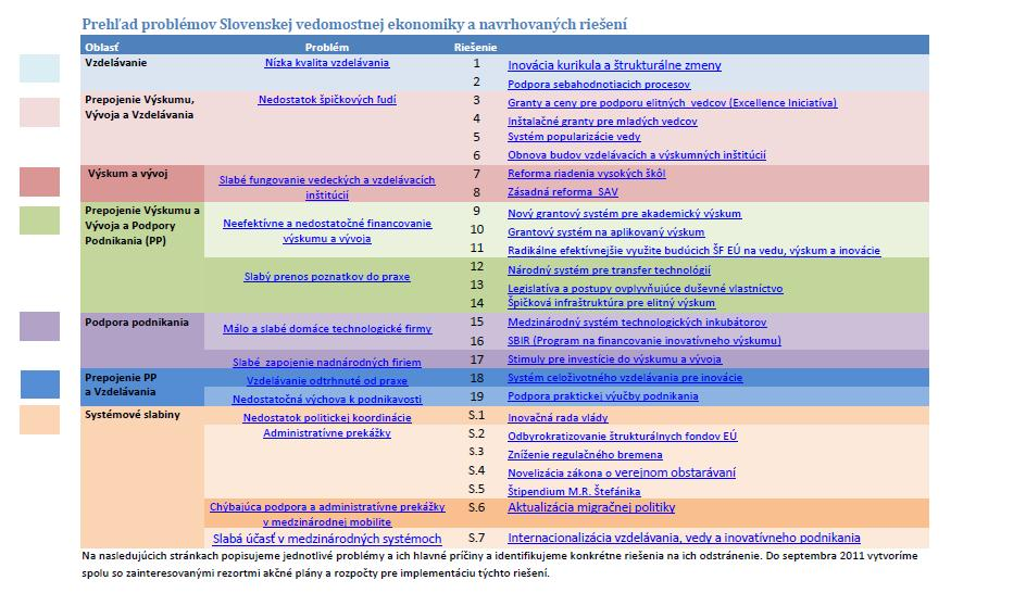 Prehľad problémov Slovenskej vedomostnej ekonomiky a navrhovaných riešení